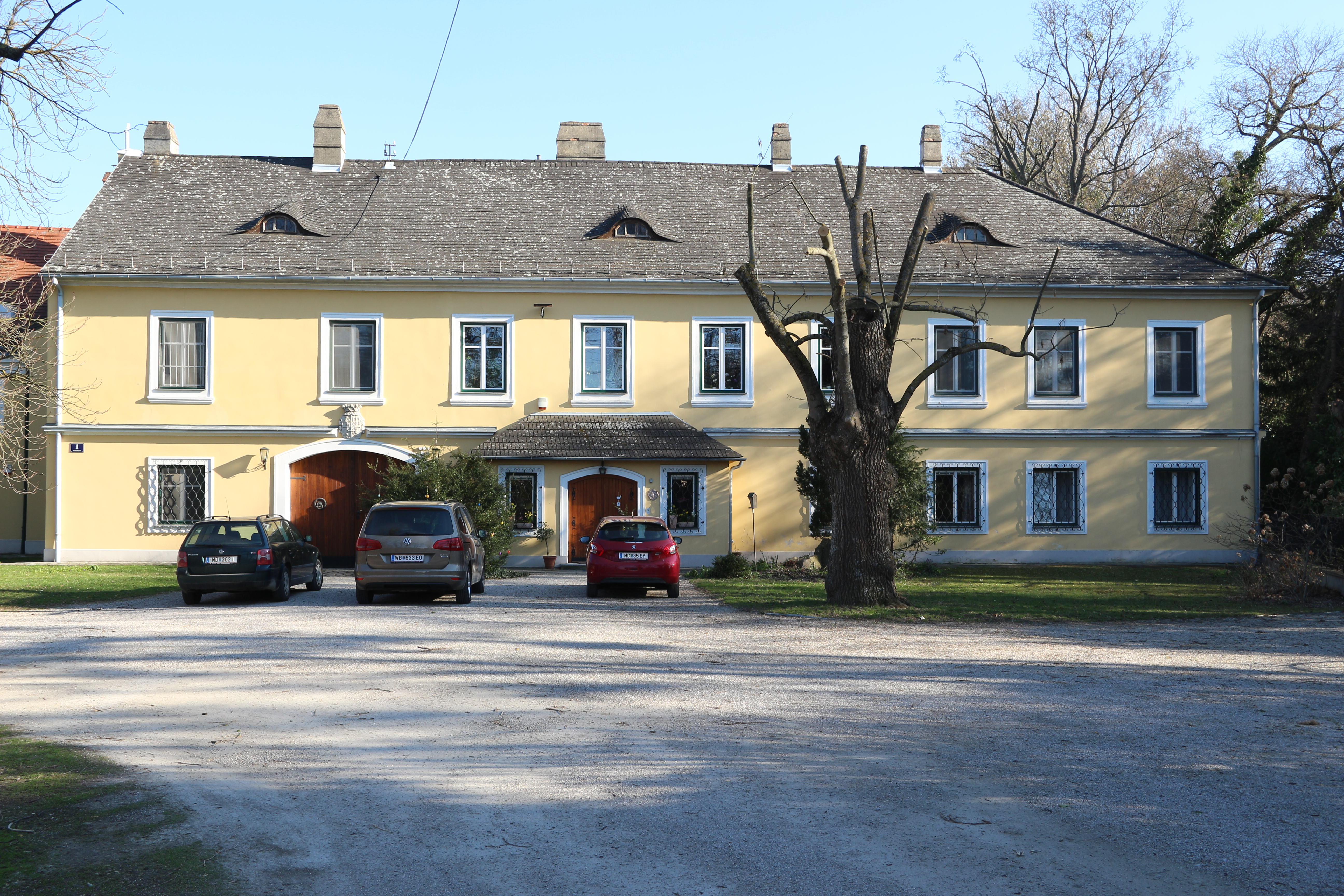 Schloss Achau in der gleichnamigen Gemeinde, Niederösterreich.